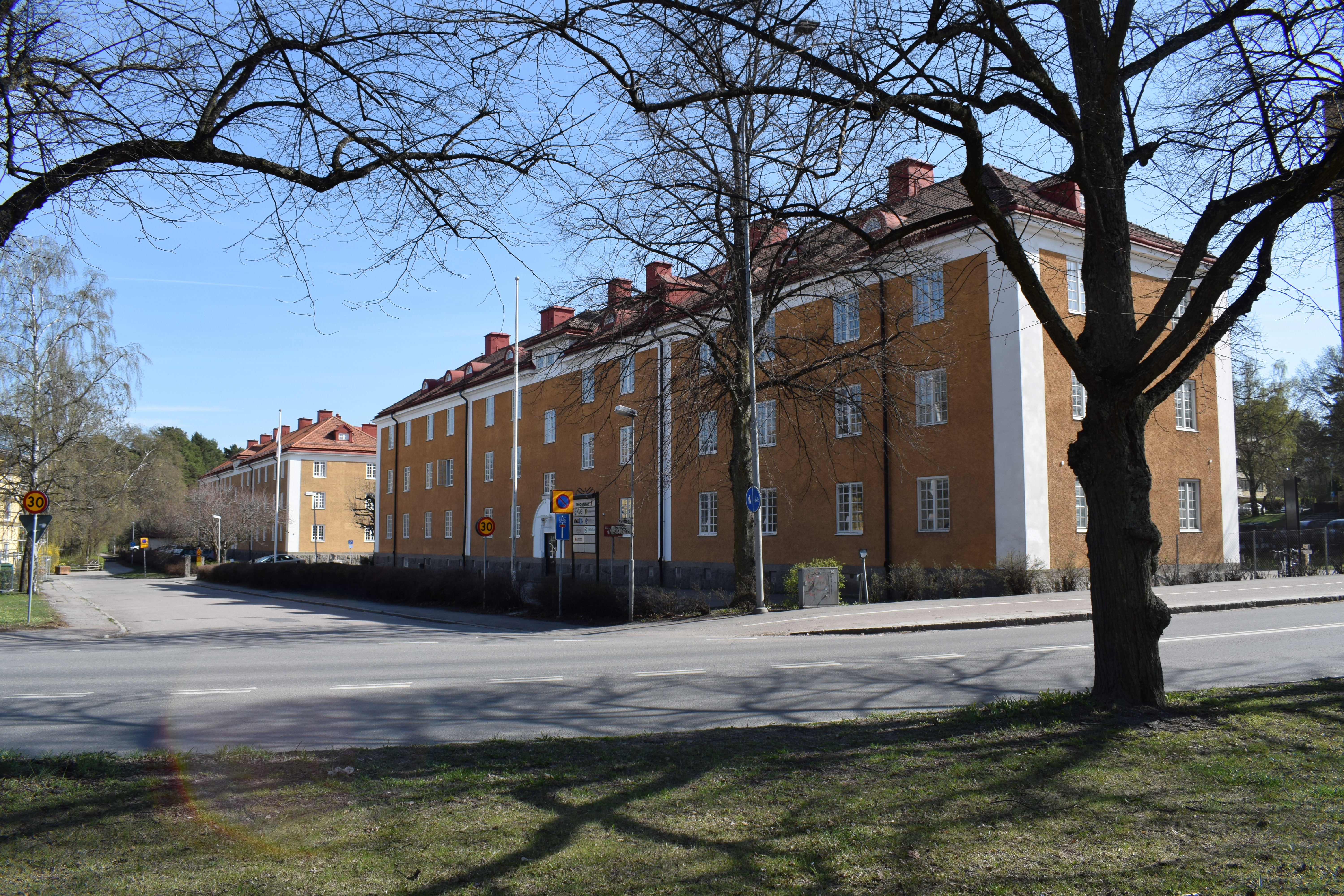 Före detta underofficersbostäder vid Skyttegatan 2-4 i Linköping, uppförda 1917 till Första livgrenadjärregementet och Andra livgrenadjärregementet.